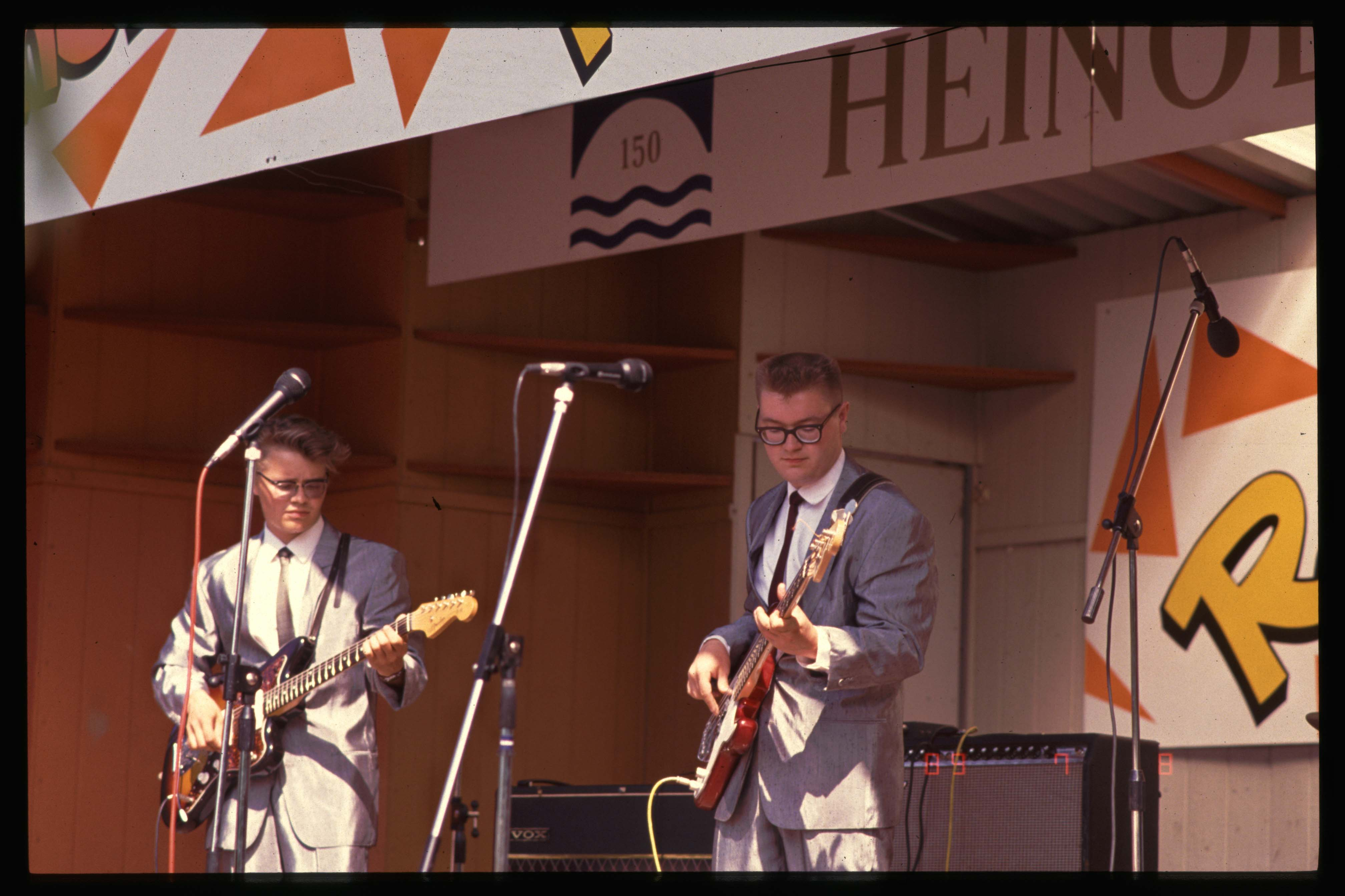 Kuva The Quiets yhtyeen esityksestä Heinolassa 8. heinäkuuta vuodelta 1989